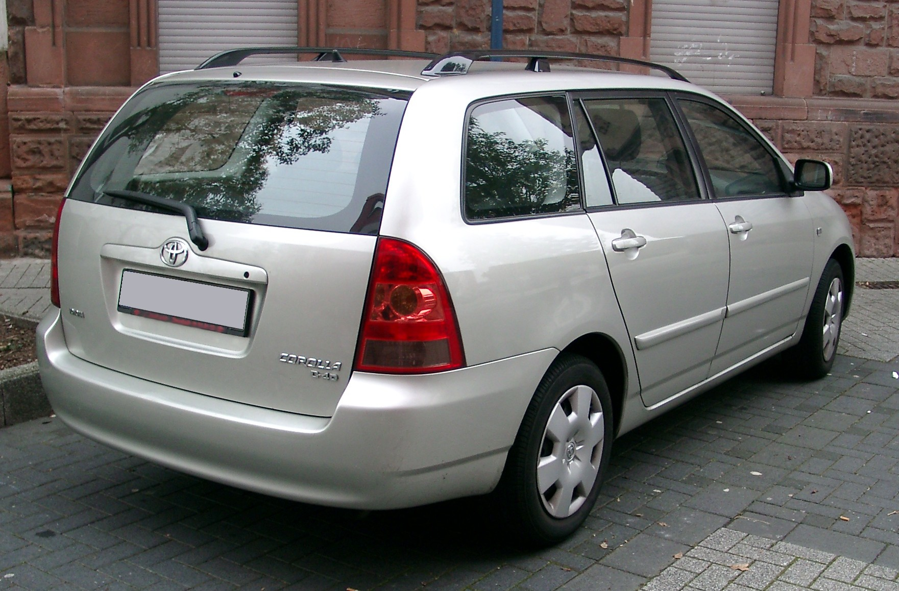 Toyota Corolla E12